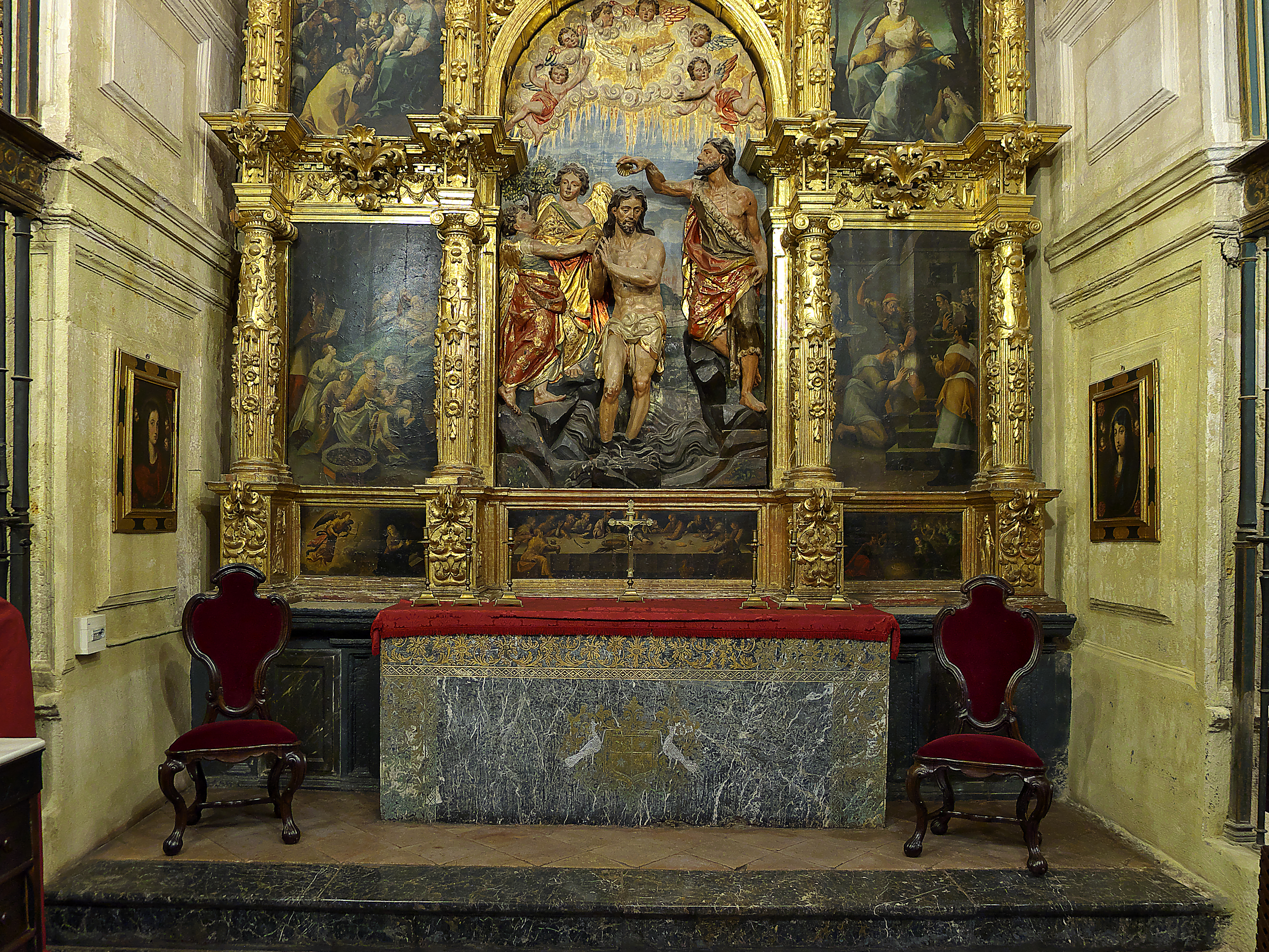 Detalle del motivo central del retablo.